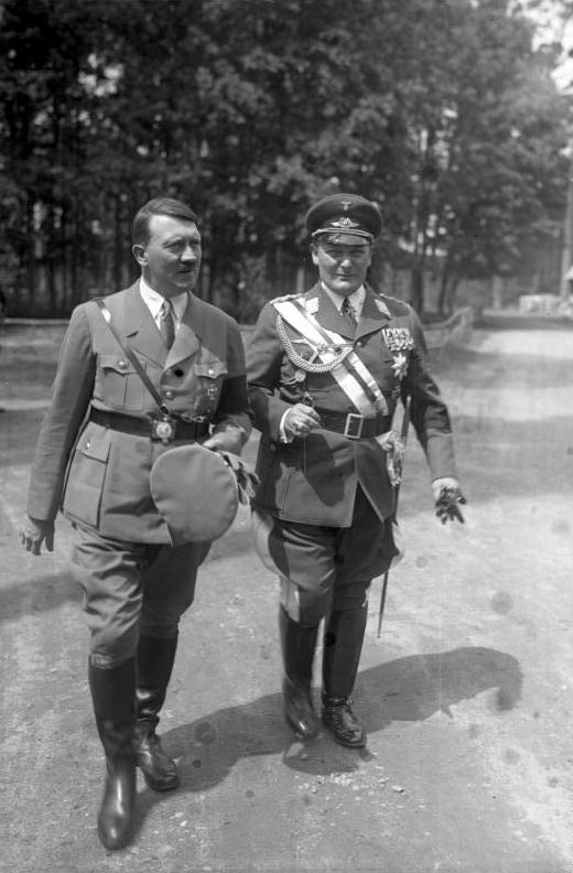 Sie schlugen zu! Neueste Aufnahme des Führers Adolf Hitler mit dem Ministerpräsidenten General Hermann Göring [in der Schorfheide, 19.6.1934]